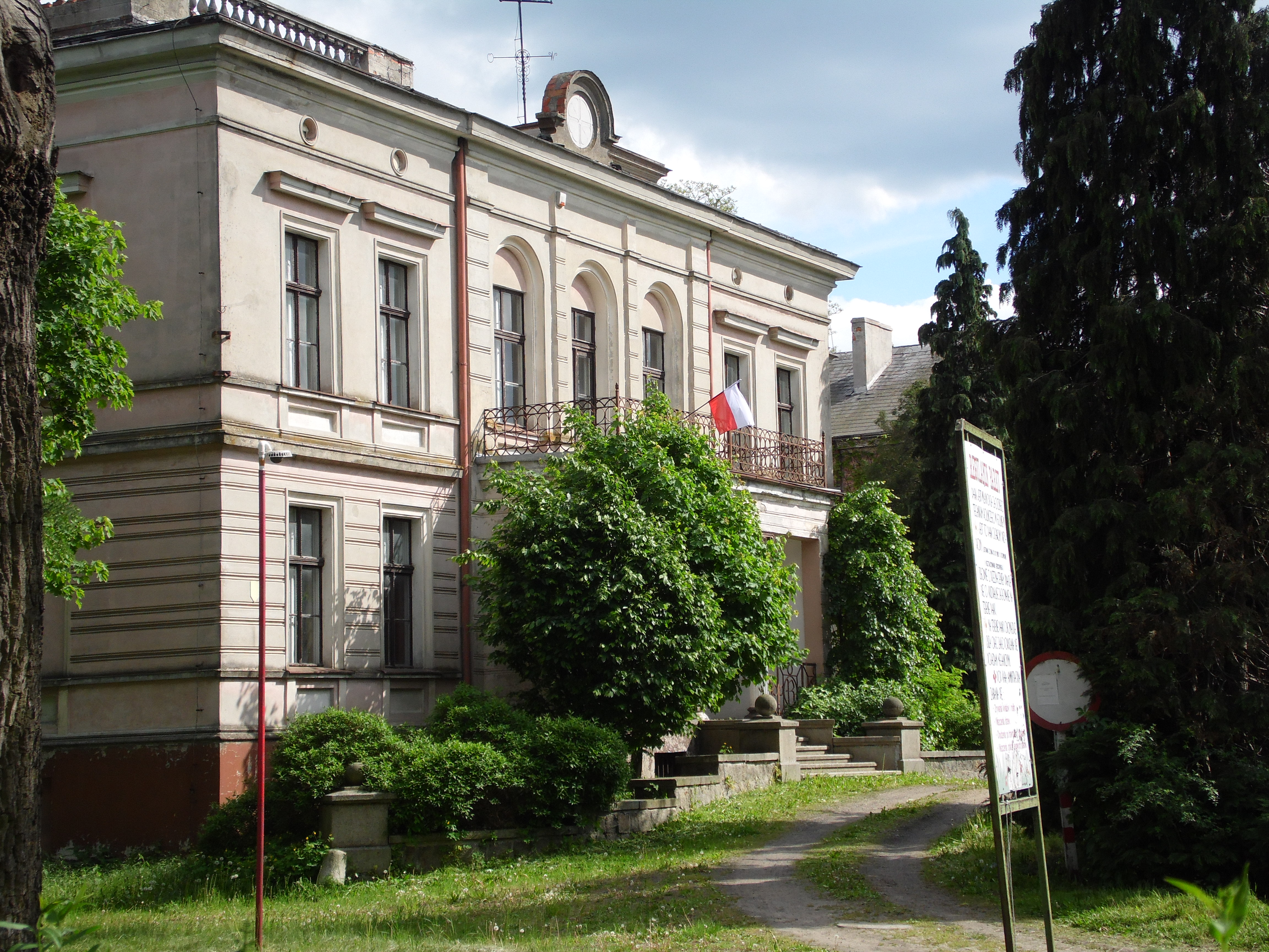 Golina Wielka - pałac, 1888